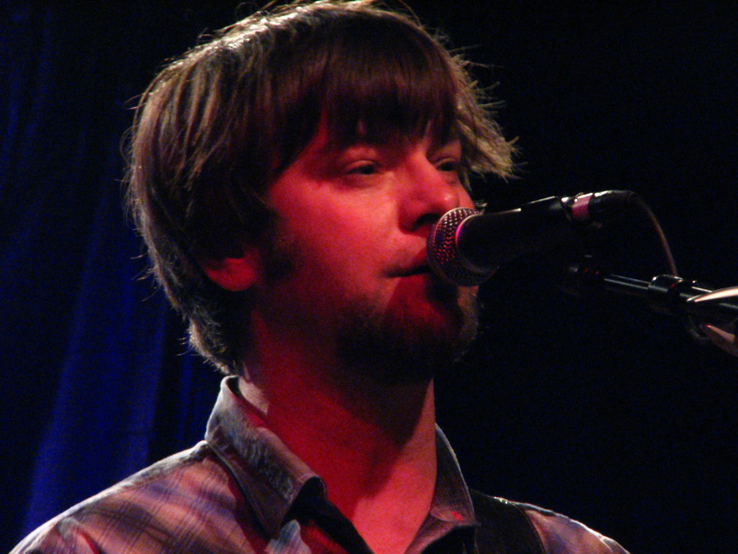 Son Volt/Magnolia Electric Co., El Rey, Los Angeles, 4/3/07